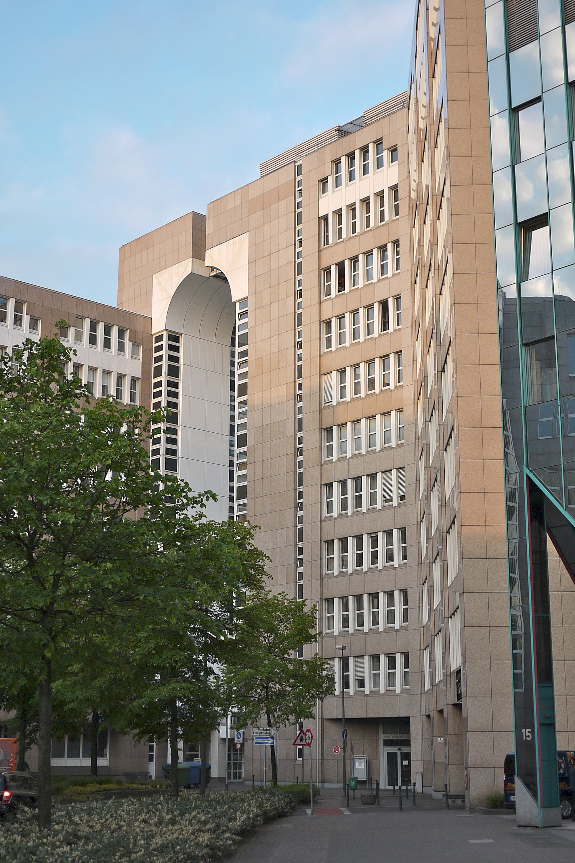 Justizzentrum Ludwig-Erhard-Allee 21, Düsseldorf. LAG Düsseldorf, Arbeitsgericht Düsseldorf, Finanzgericht Düsseldorf und Sozialgericht Düsseldorf